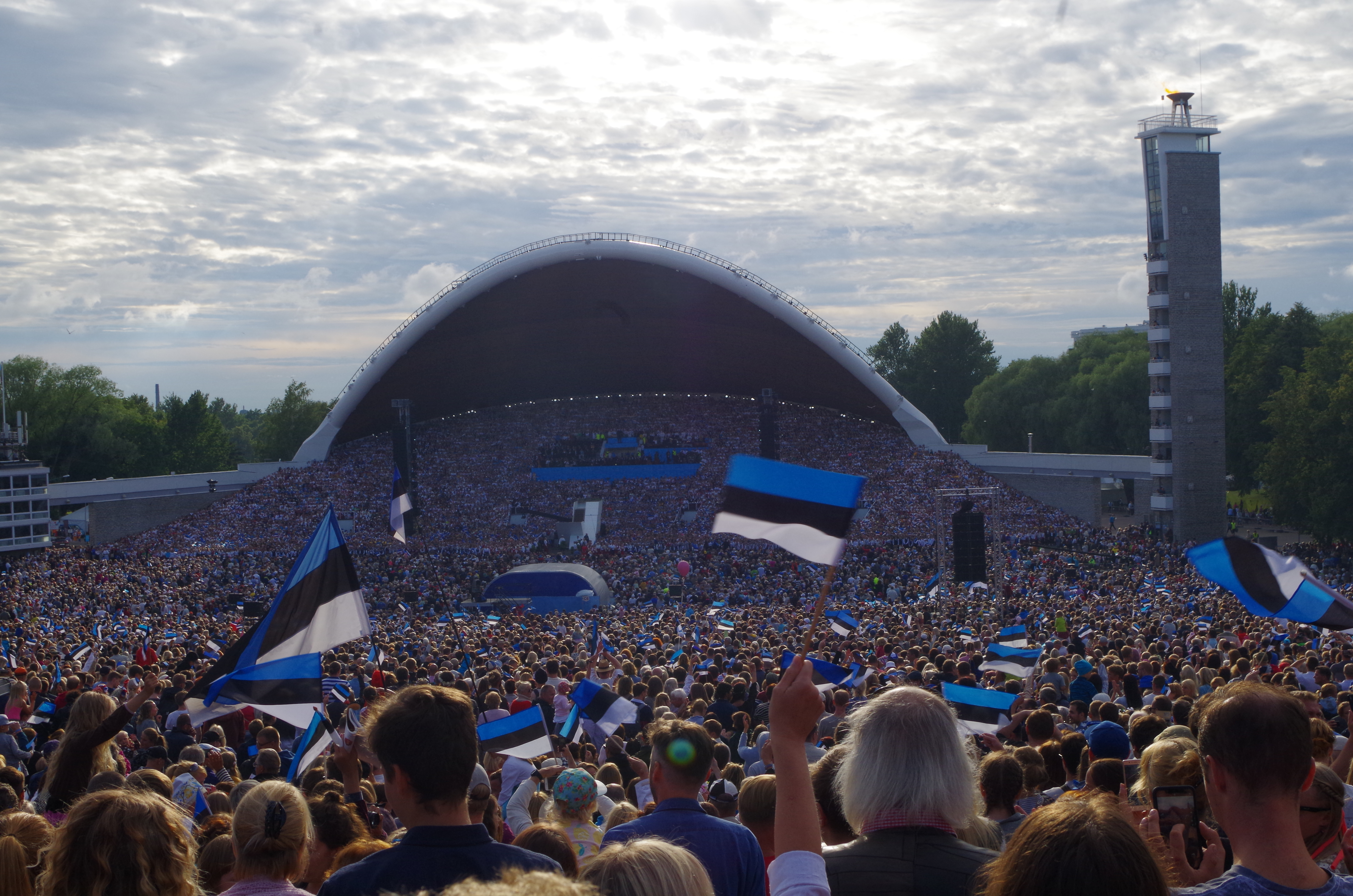 Vaade laulukaarele Lauluväljakult 7. juulil 2019